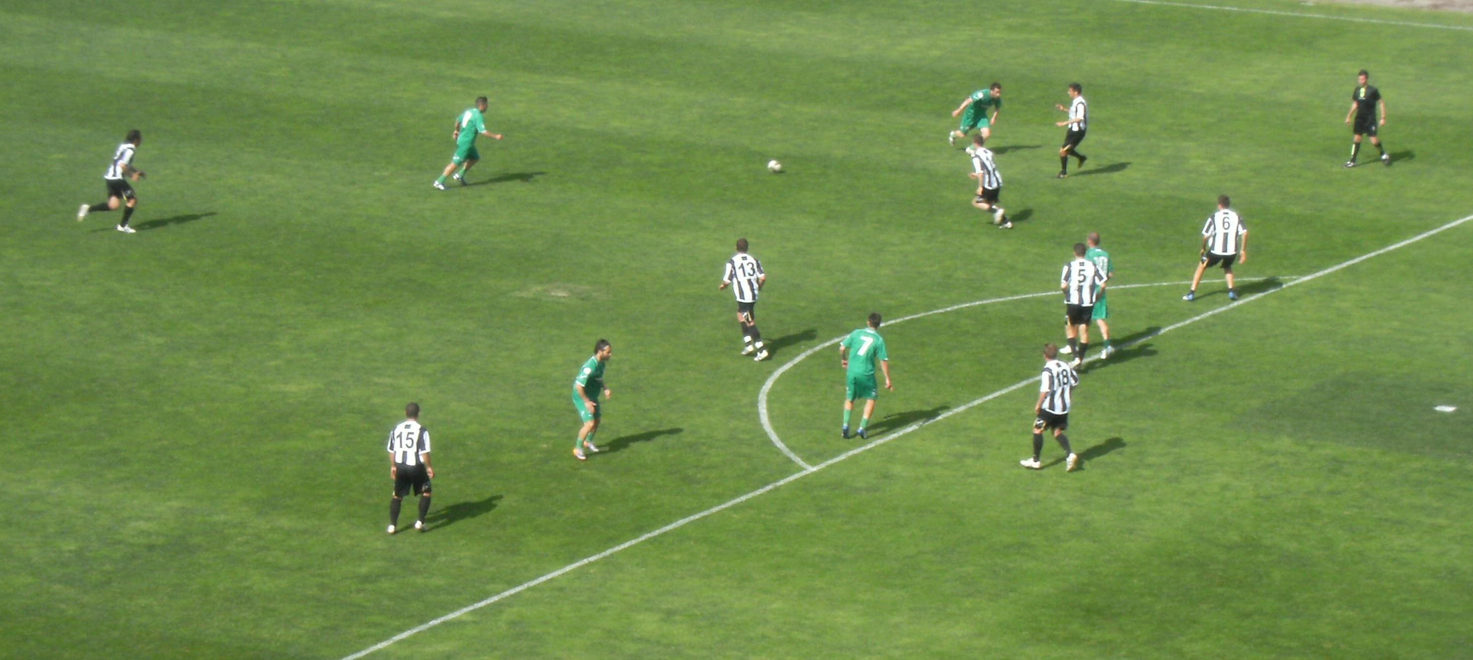 AS Avellino-Battipagliese (4-1, amichevole) Stadio "Partenio-Lombardi" di Avellino